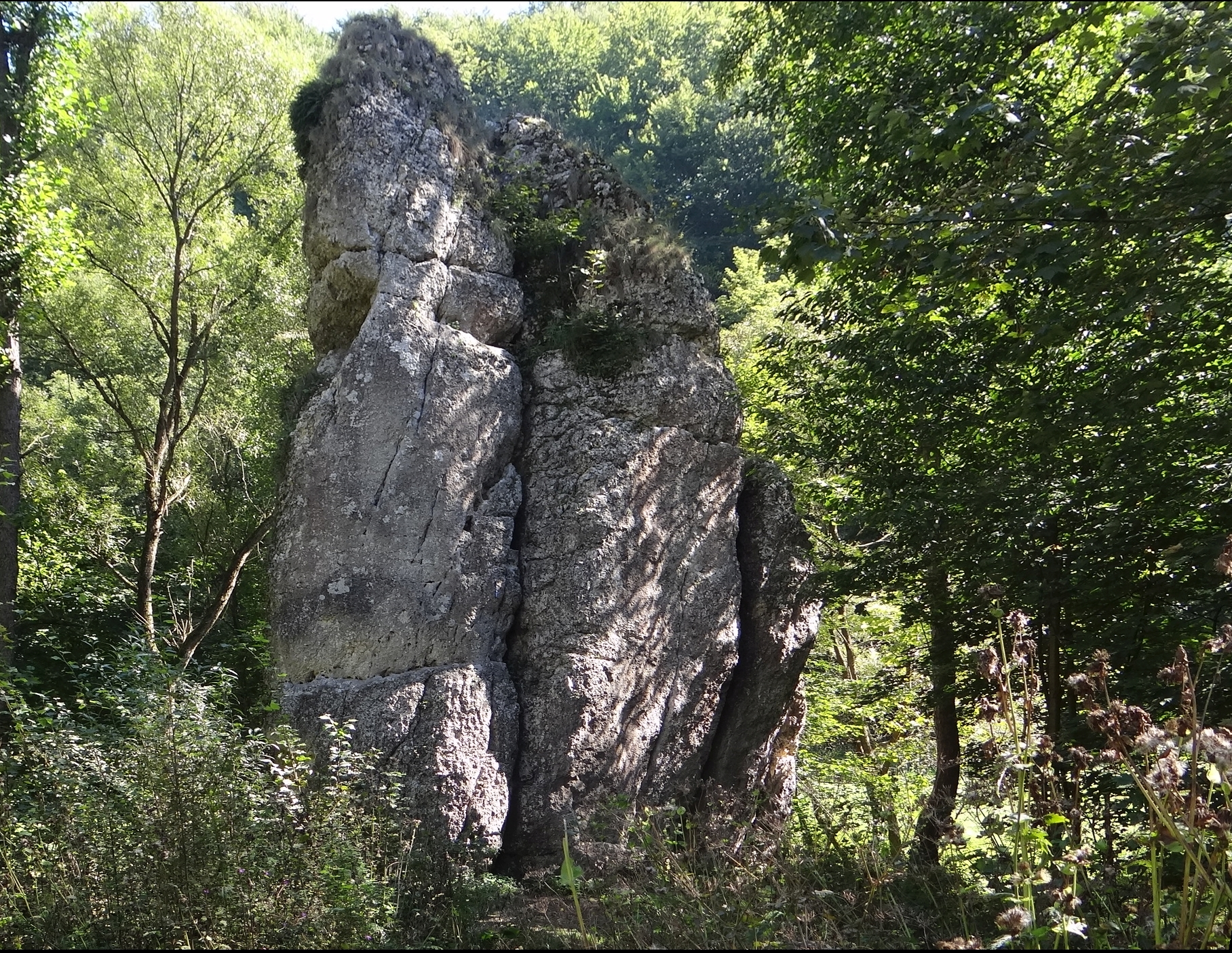 Skała Babka w Dolinie Będkowskiej